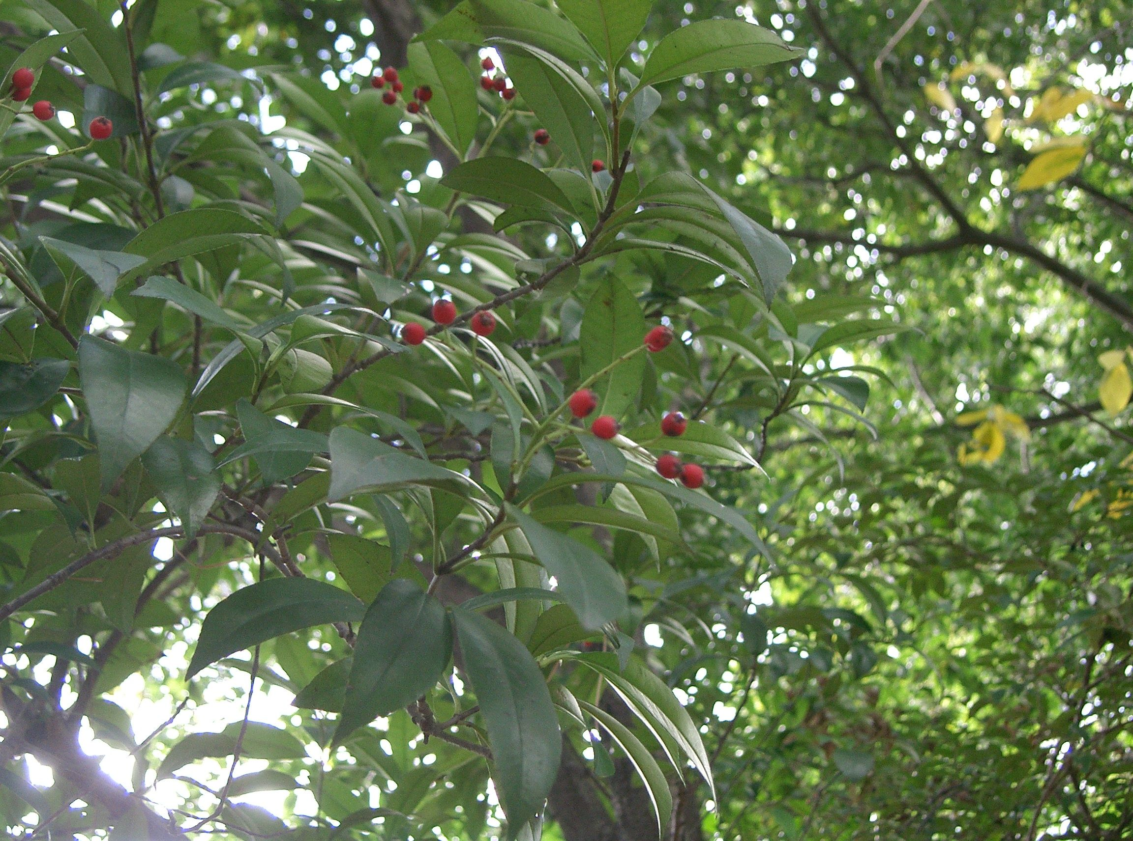 Photinia glabra